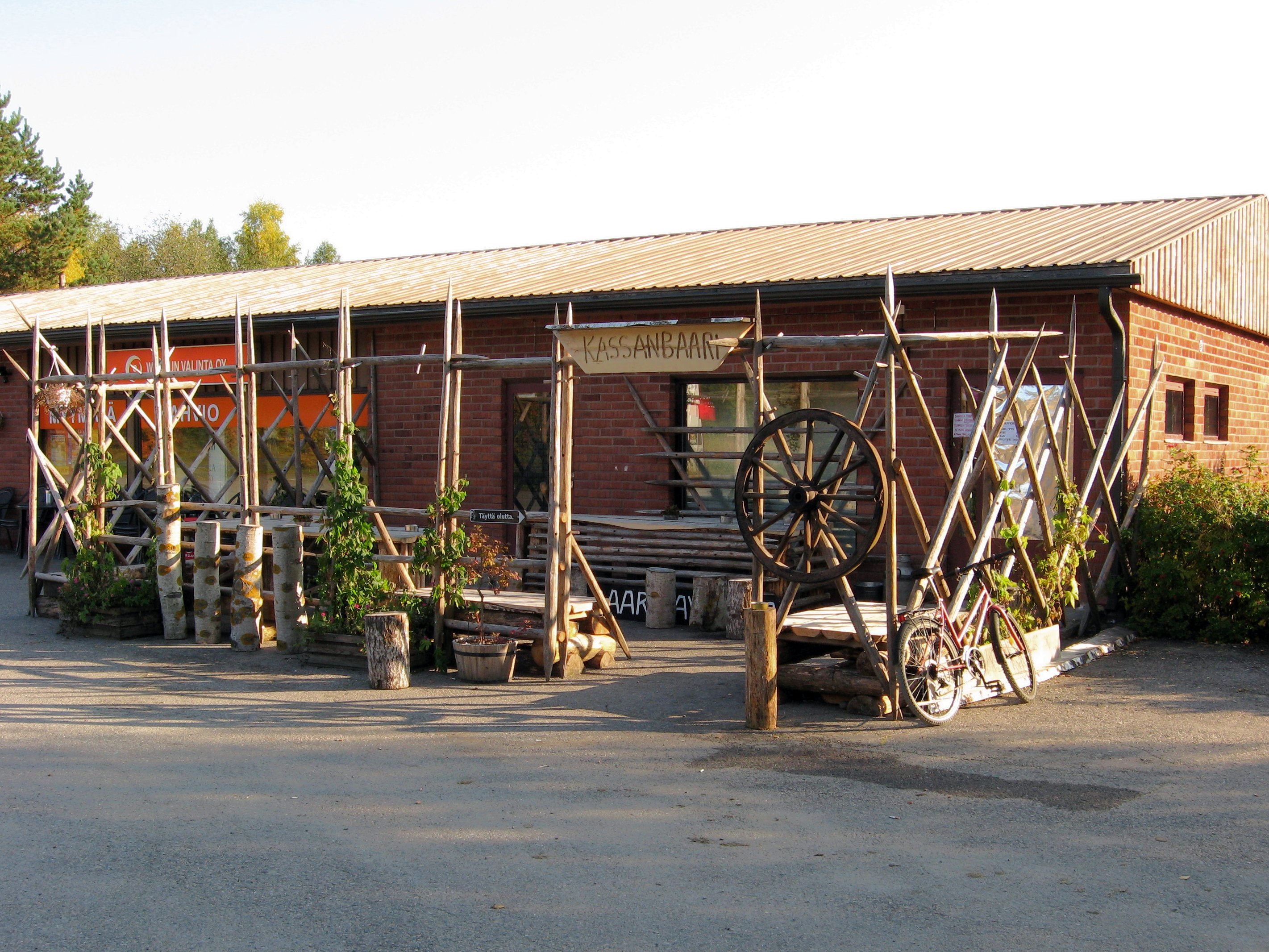 Kassan Baari Tohmajärven Tikkalassa